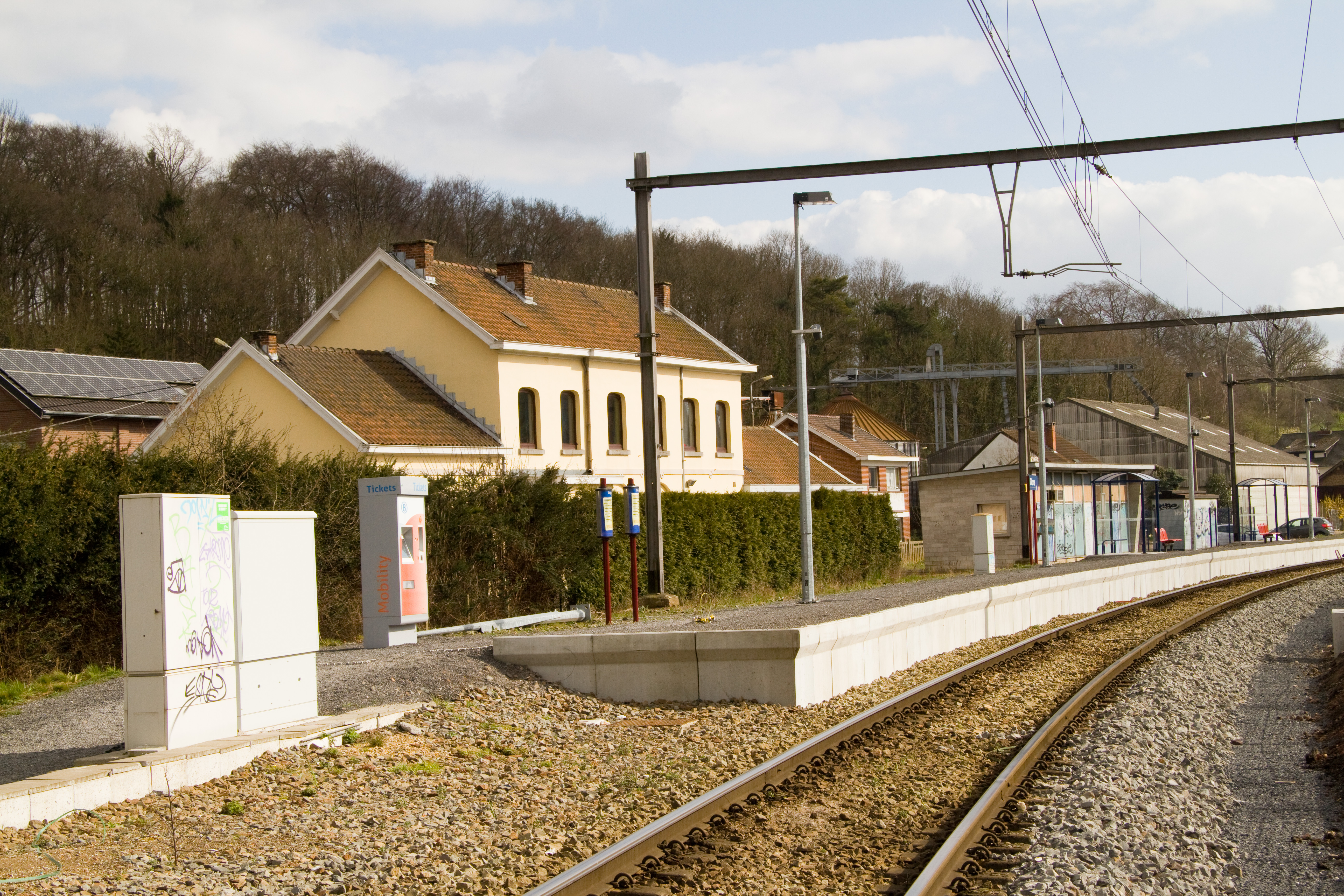 L'ancienne gare est devenue une habitation privée; le quai,par contre, a été remis à neuf.